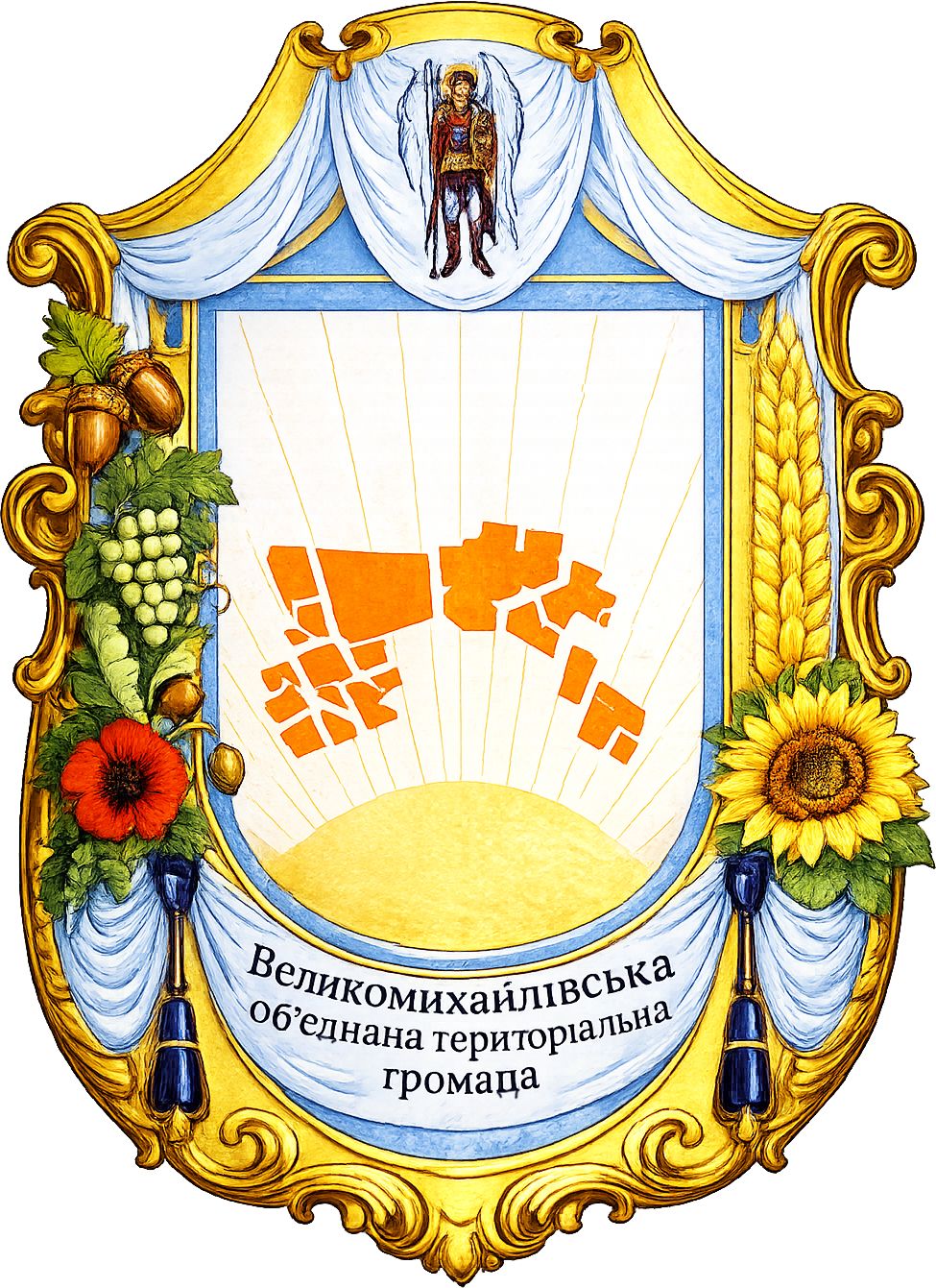 Герб Великомихайлівської селищної громади, Одеська область